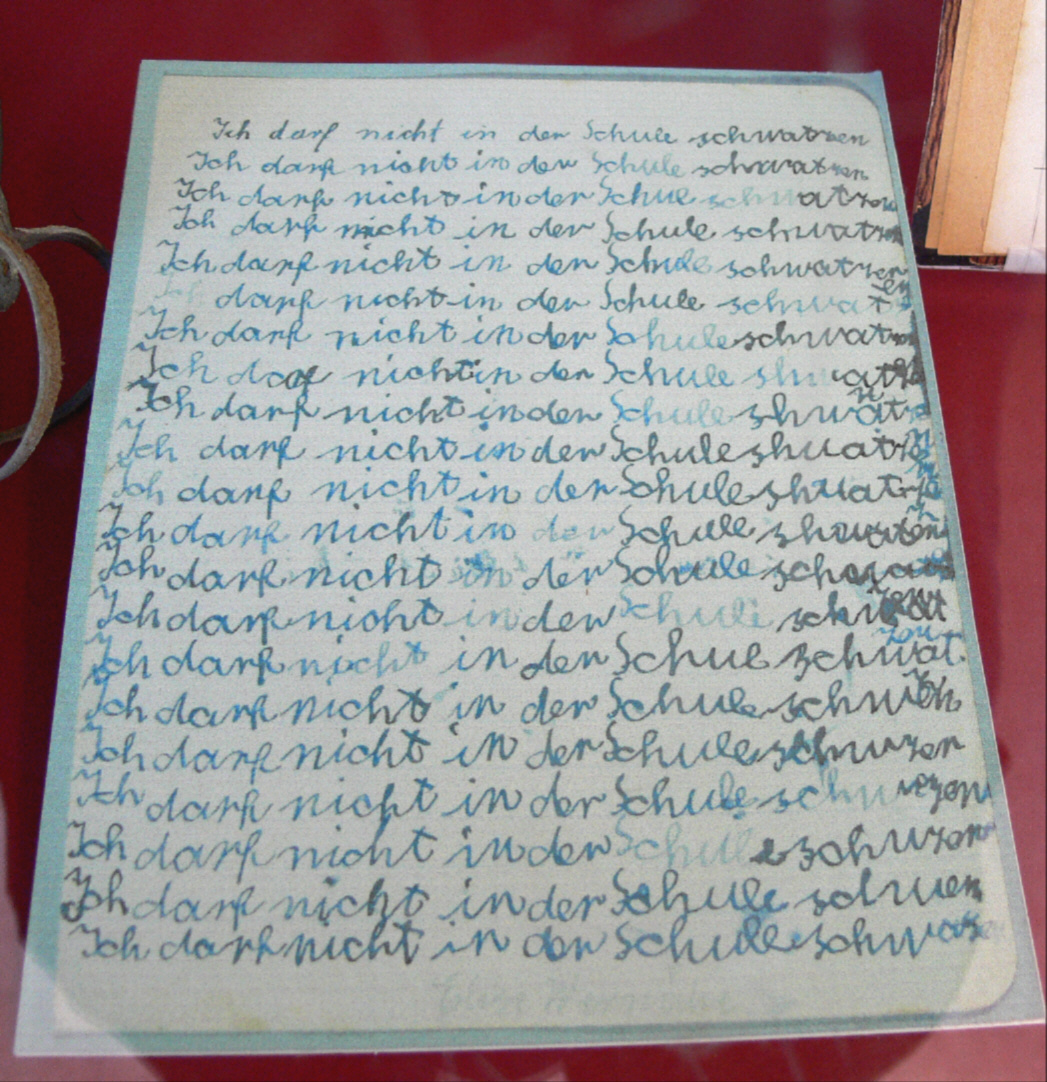 Sammlung Kindheit und Jugend (Stiftung Stadtmuseum Berlin) Strafarbeit